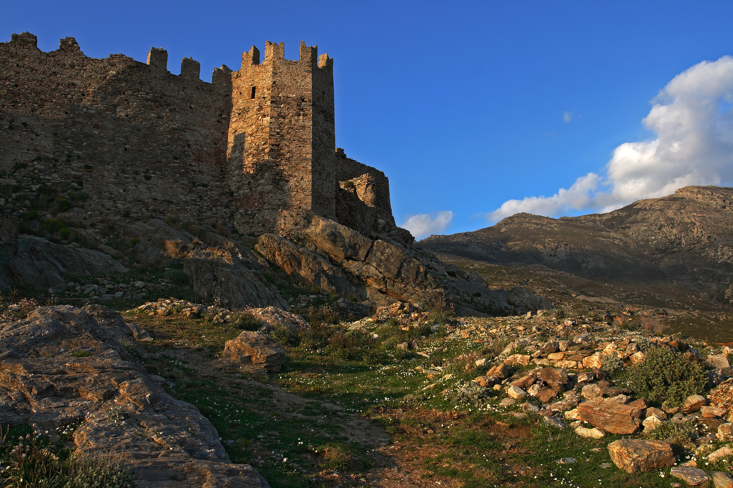 Καστέλο Ρόσσο«Καστέλο Ρόσσο»